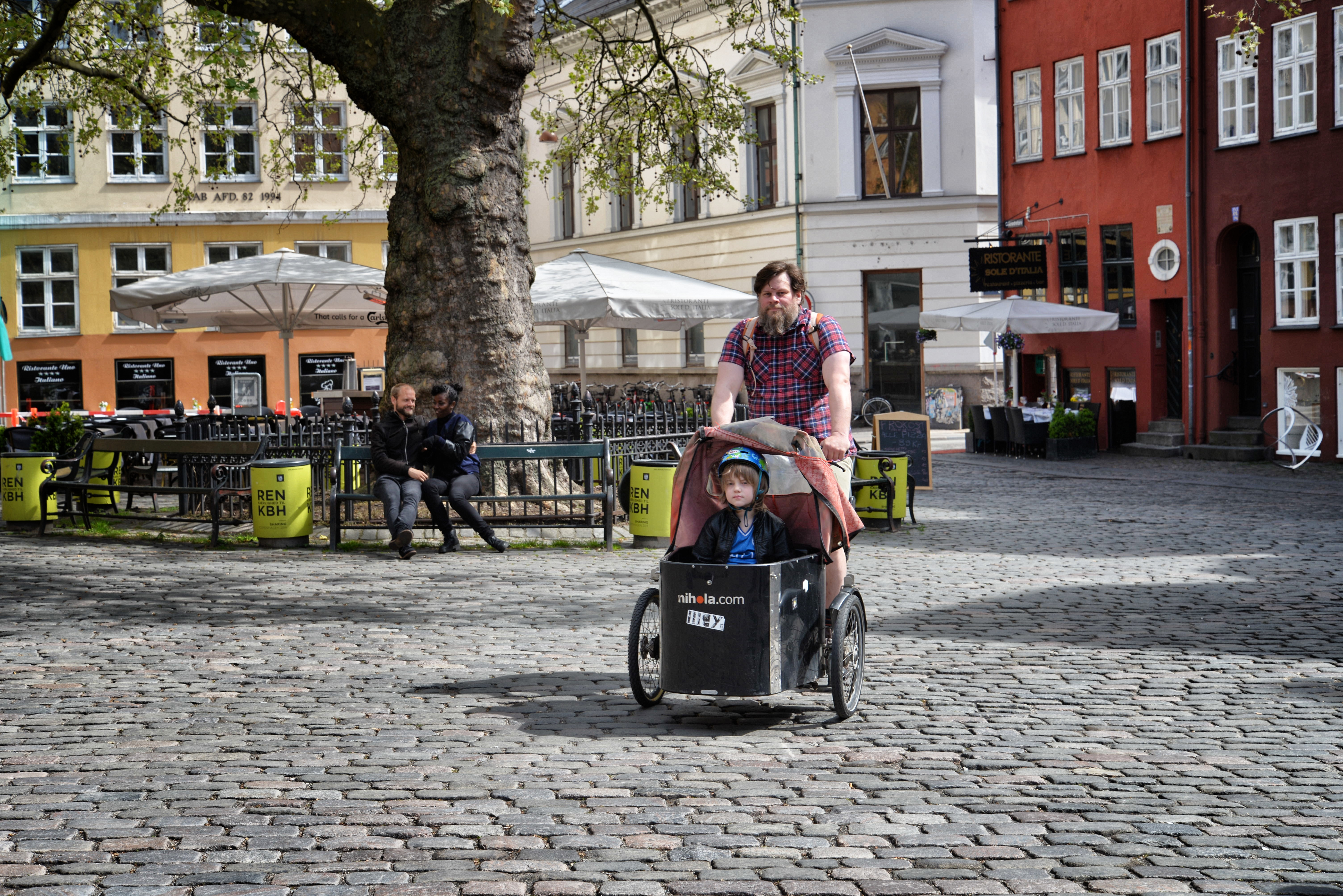 Cycling at Gråbrødretorv in Copenhagen, Denmark